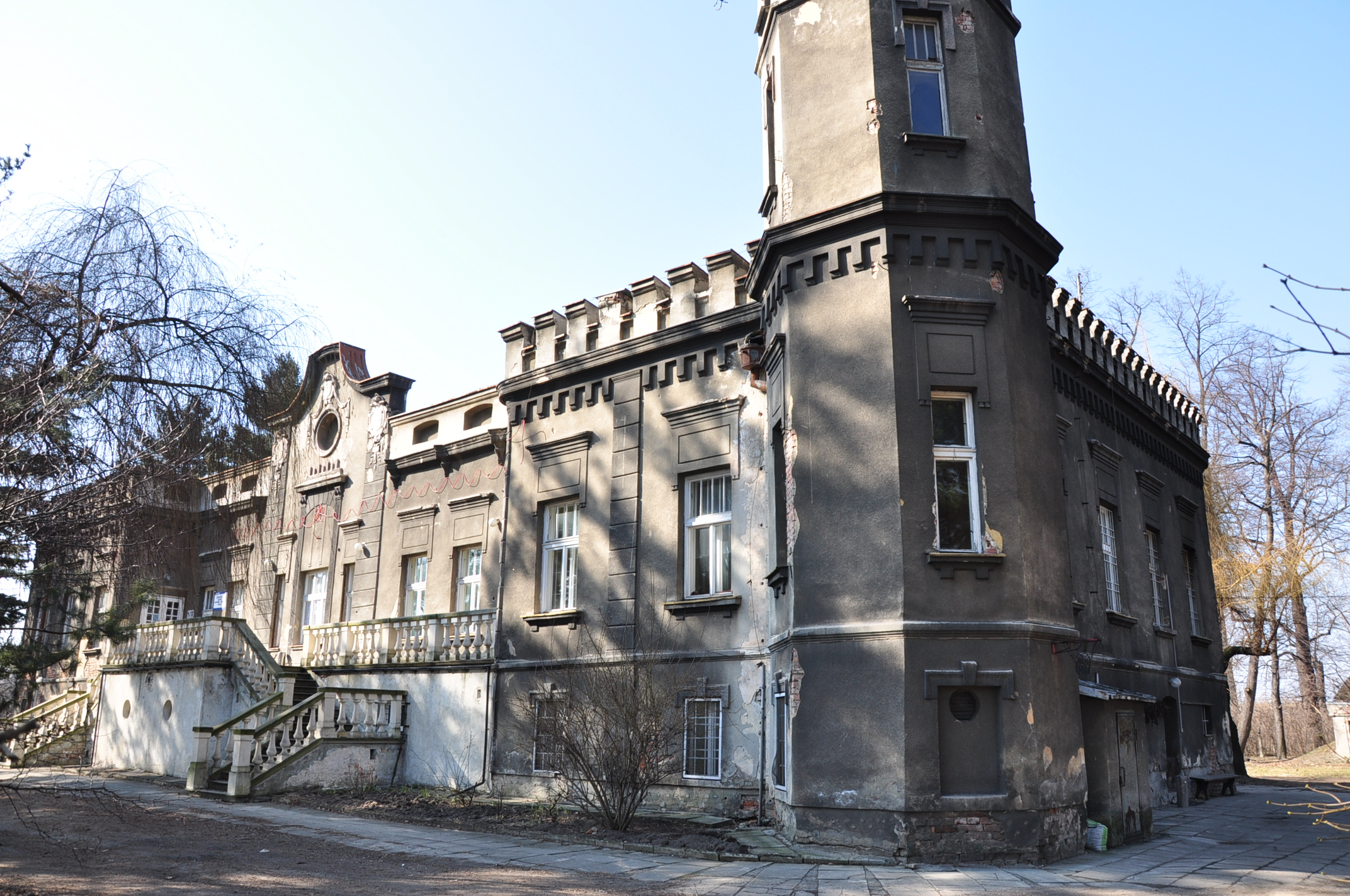 Rajsko pałac.